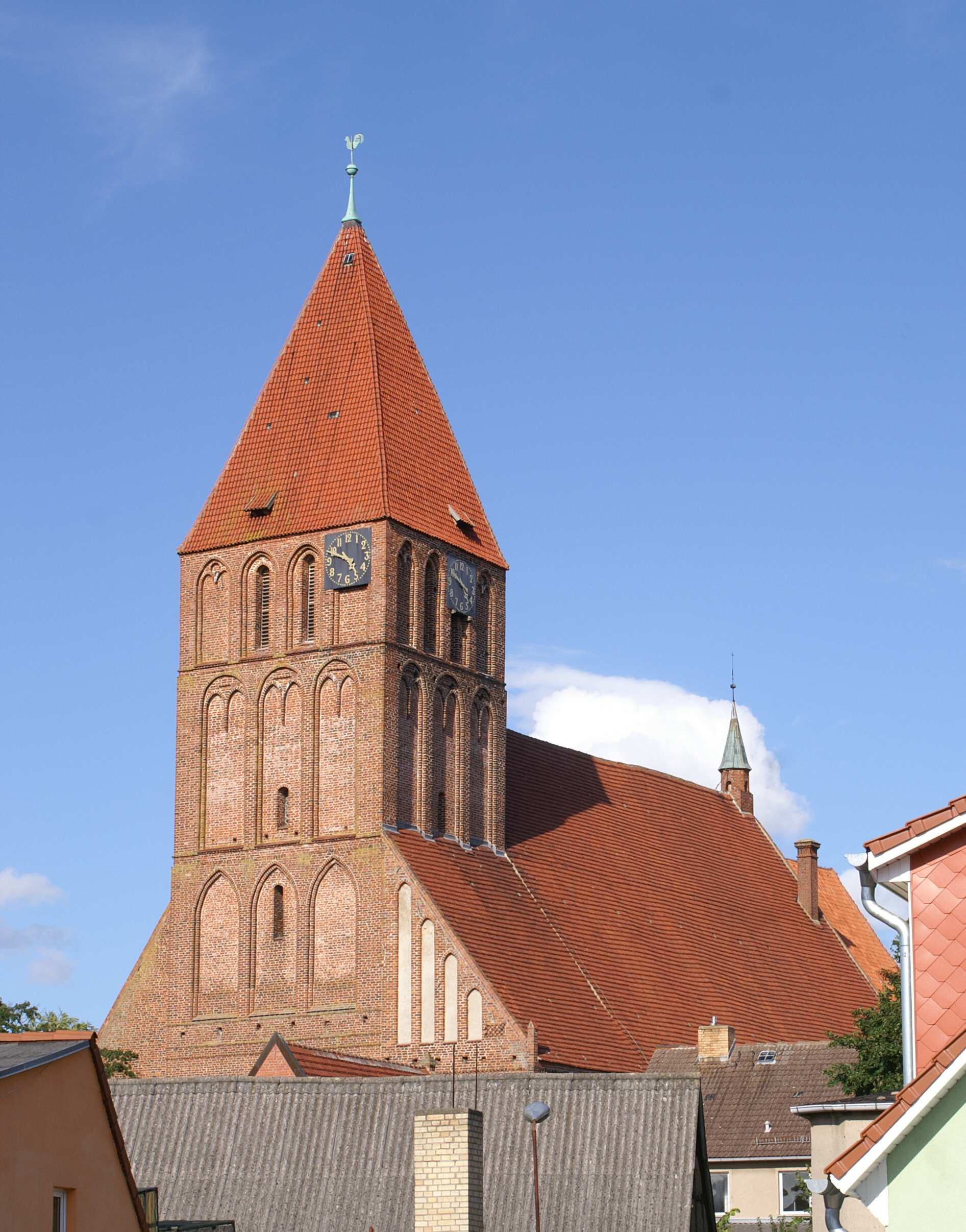 Grimmen - Landkreis Nordvorpommern - Pfarrkirche St. Marien